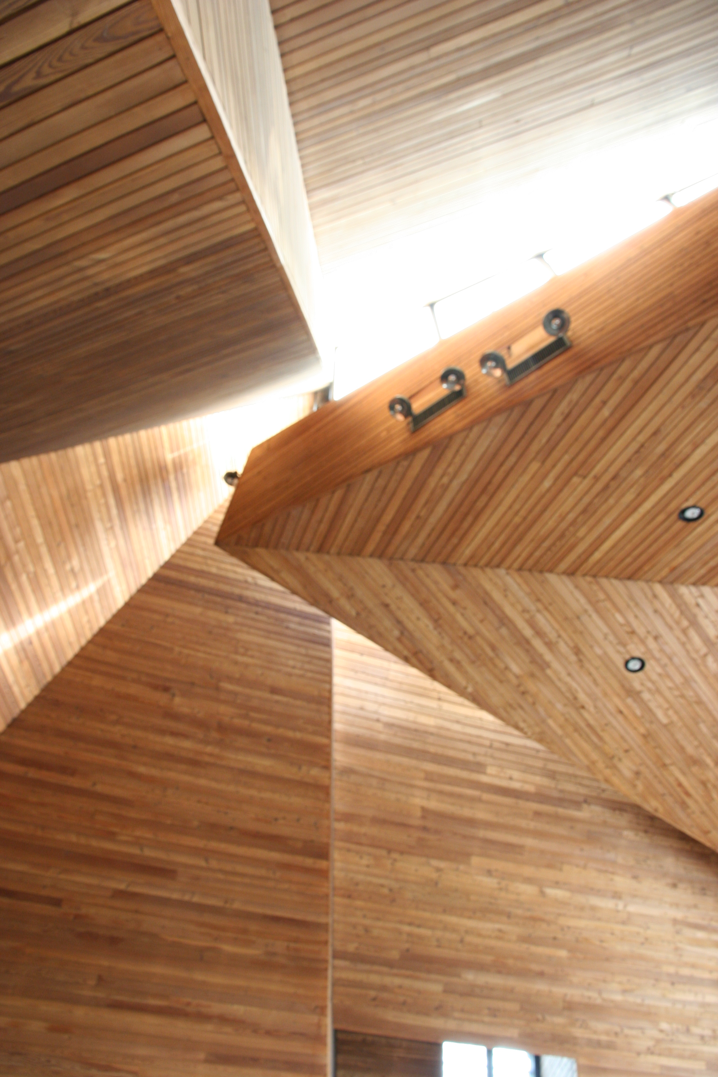 Römisch-katholische Kirche St. Franziskus Hüttwilen TG